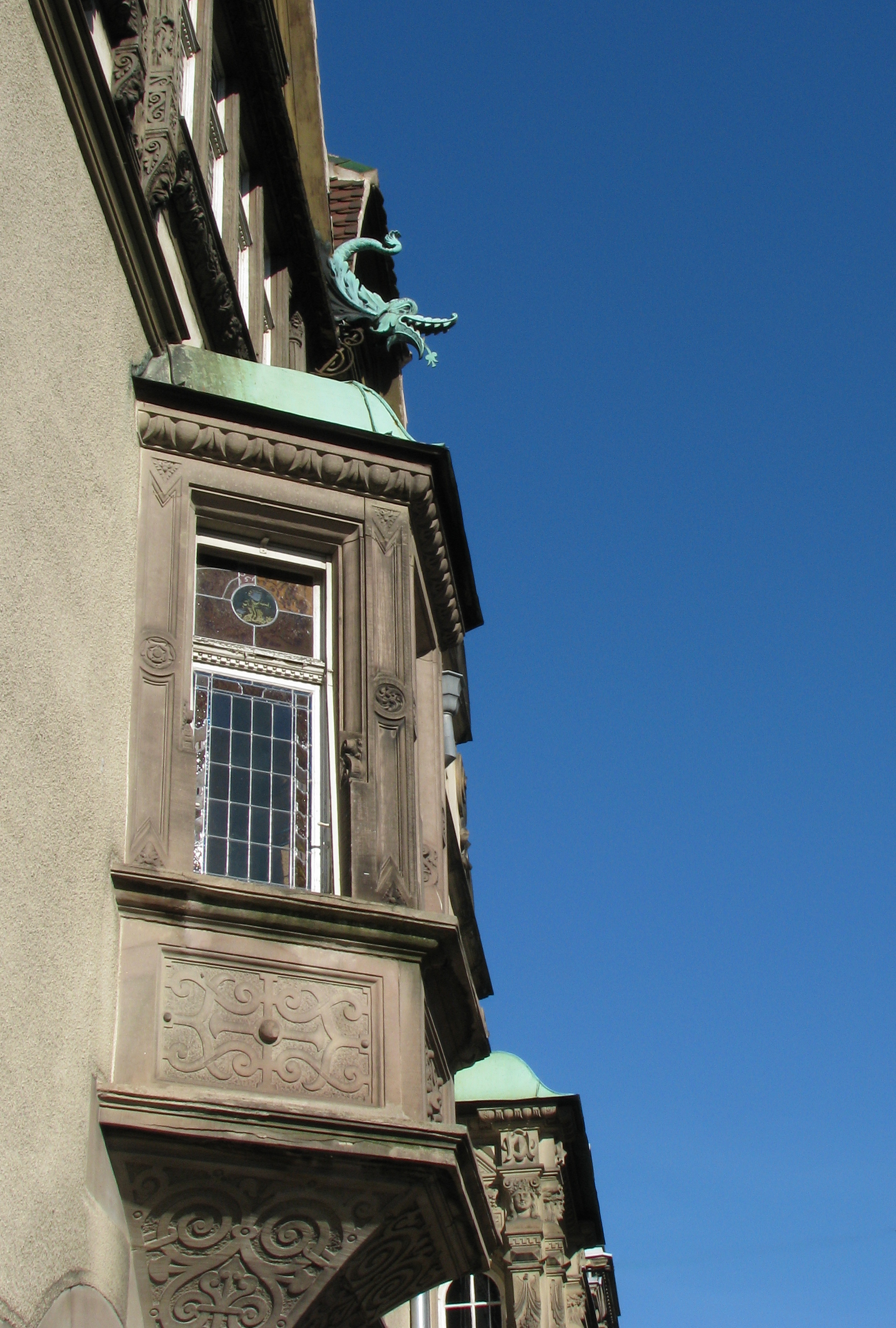 Strasbourg - Lycée international des Pontonniers : détail